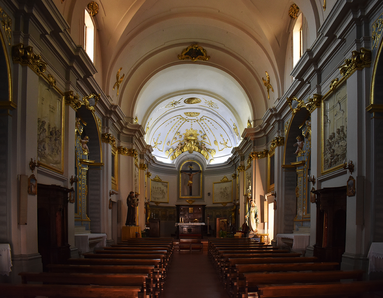 Chiesa di Sant'Antonio (interno), Giulianova